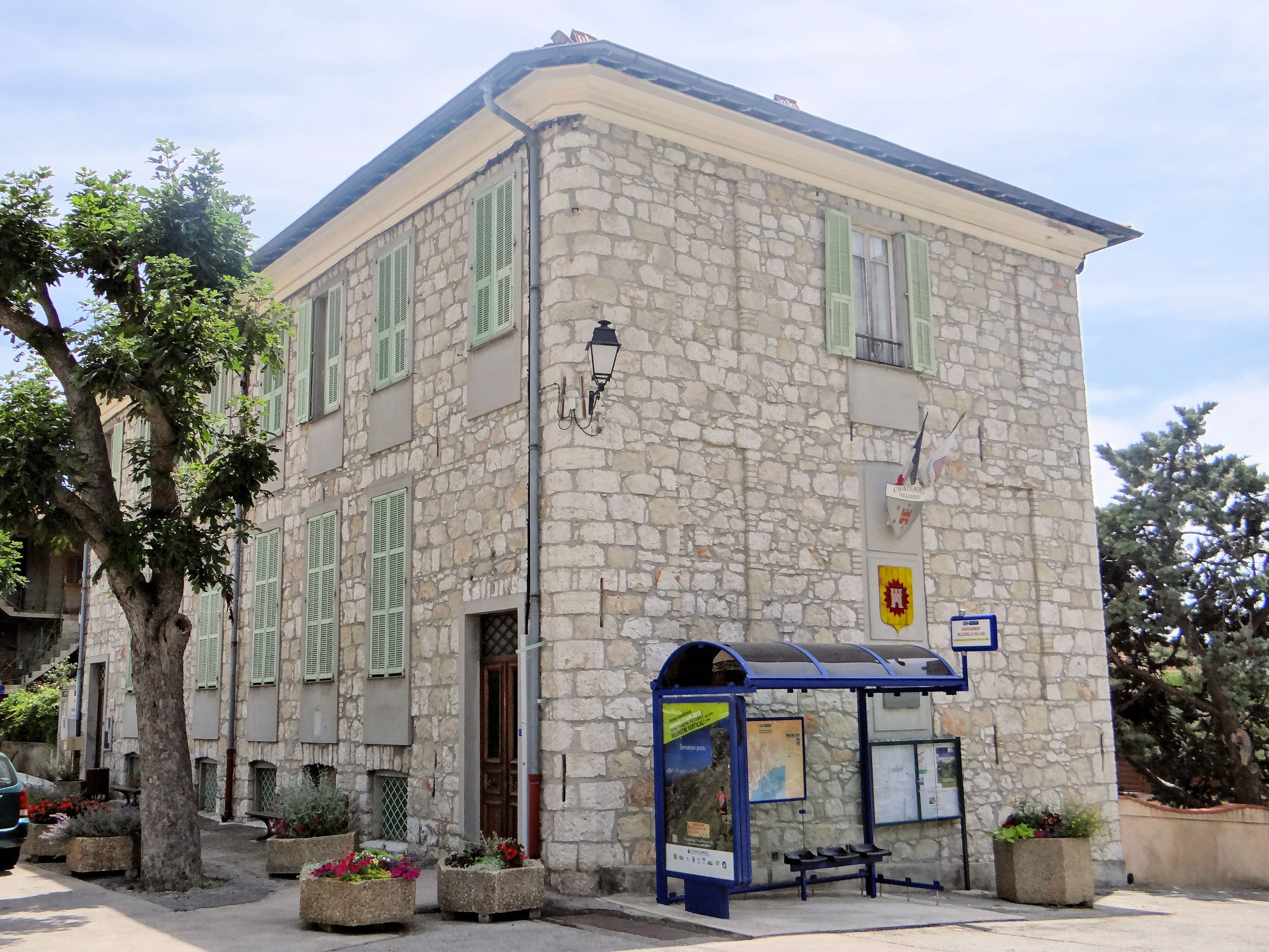 Châteauneuf-Villevieille - La mairie sur la place de la Madone